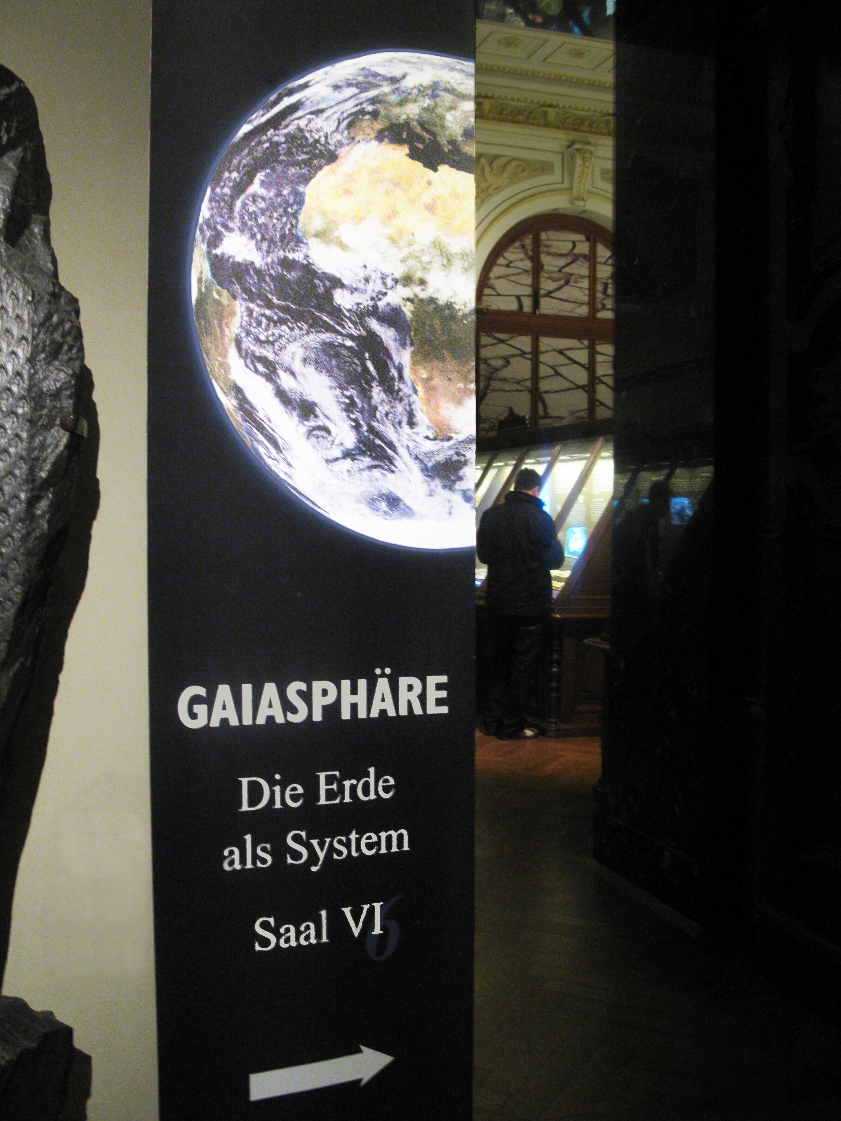 Département de Géonomie (Gaïasphère), NHM Vienne, photo S.I.Cepleanu